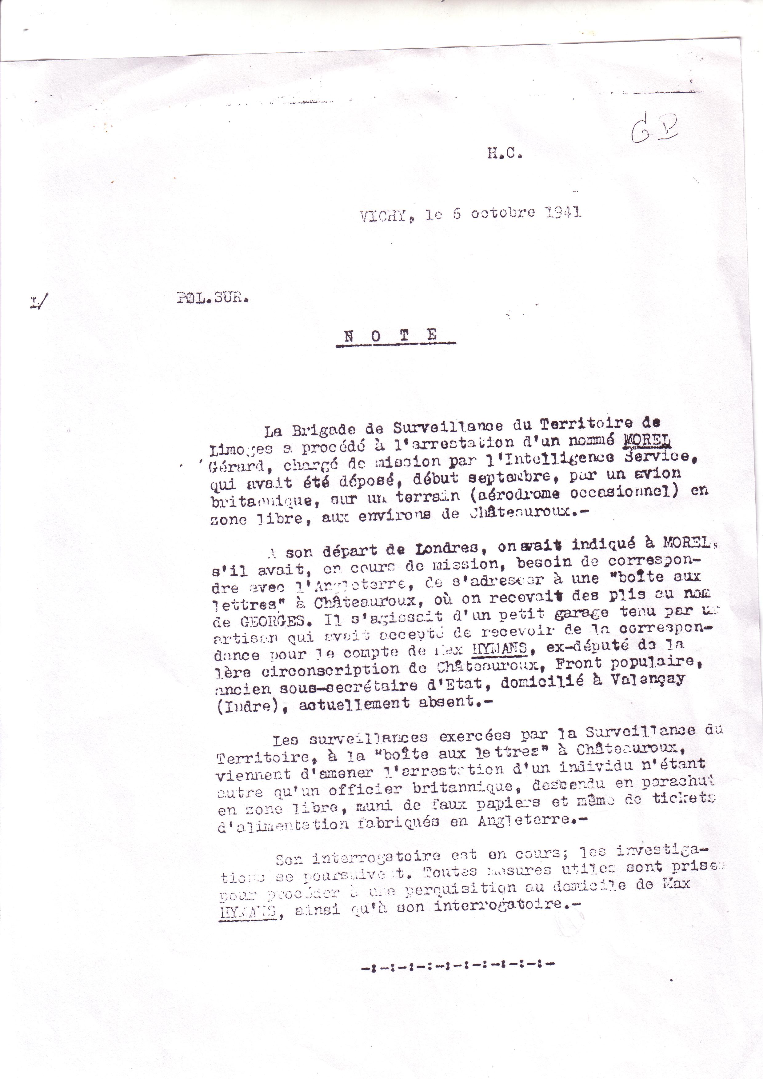 Note administrative annonçant que toutes les mesures sont prises pour une perquisition au domicile de Max Hymans.